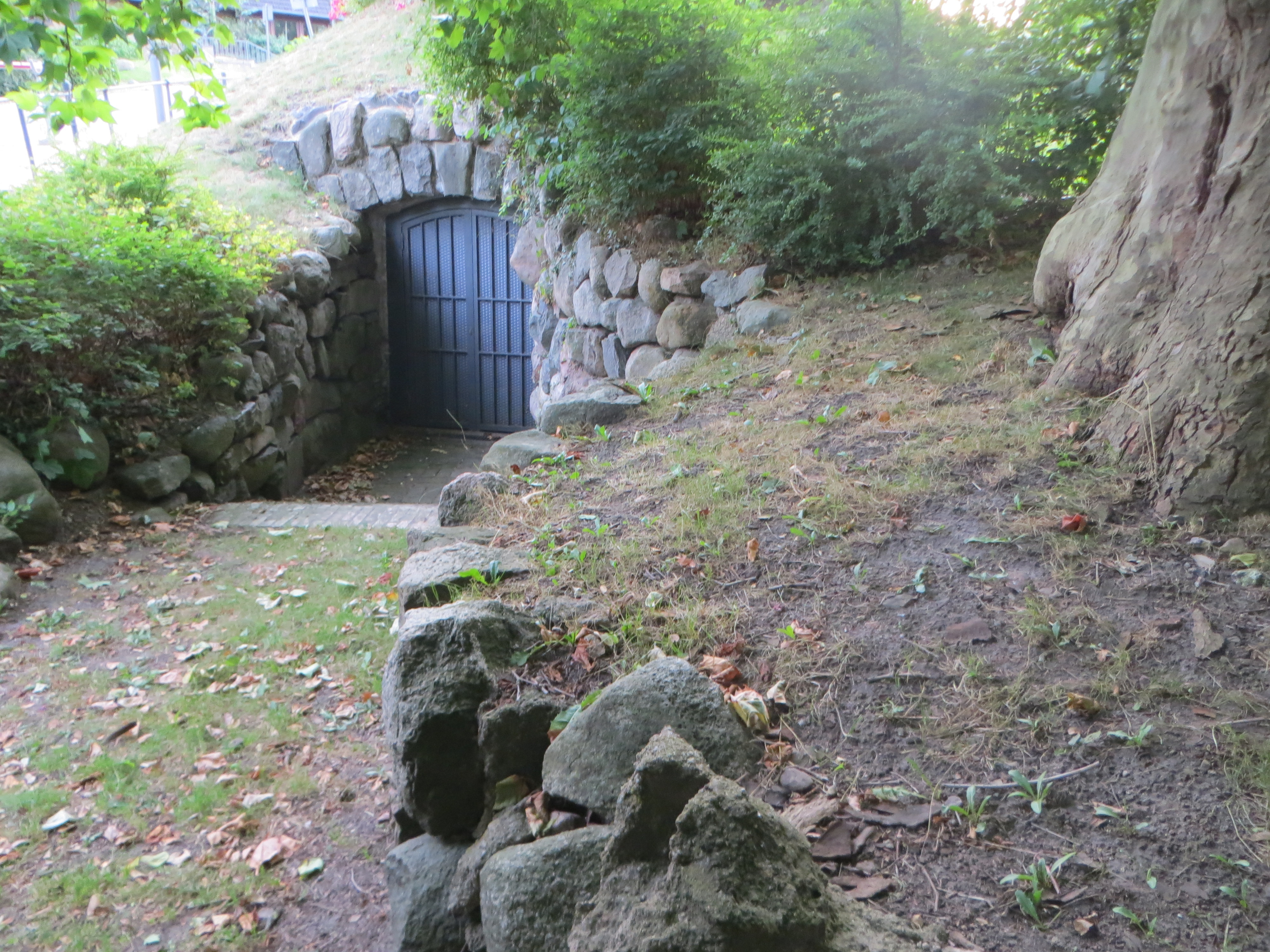 Zweiter Eingang zur Spiegelgrotte